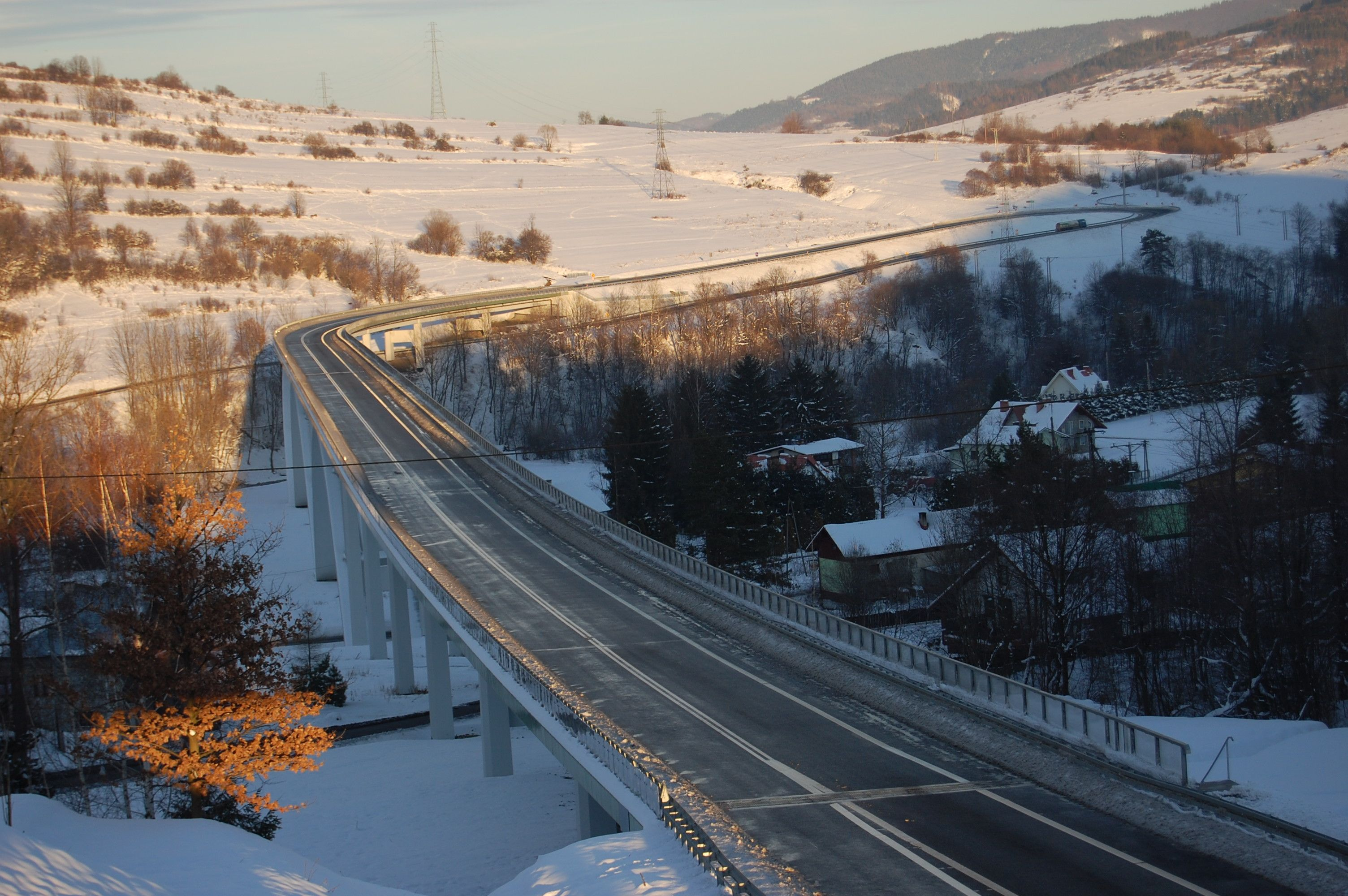 Wiadukt nad doliną Kameszniczanki o długości 654 metrów, na trasie drogi ekspresowej S1 w okolicach Milówki oraz Szare.